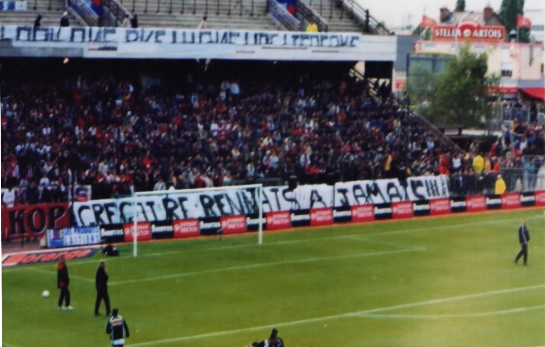 La banderole déployée par les supporters rennais pour fêter le départ de Stéphane Grégoire.